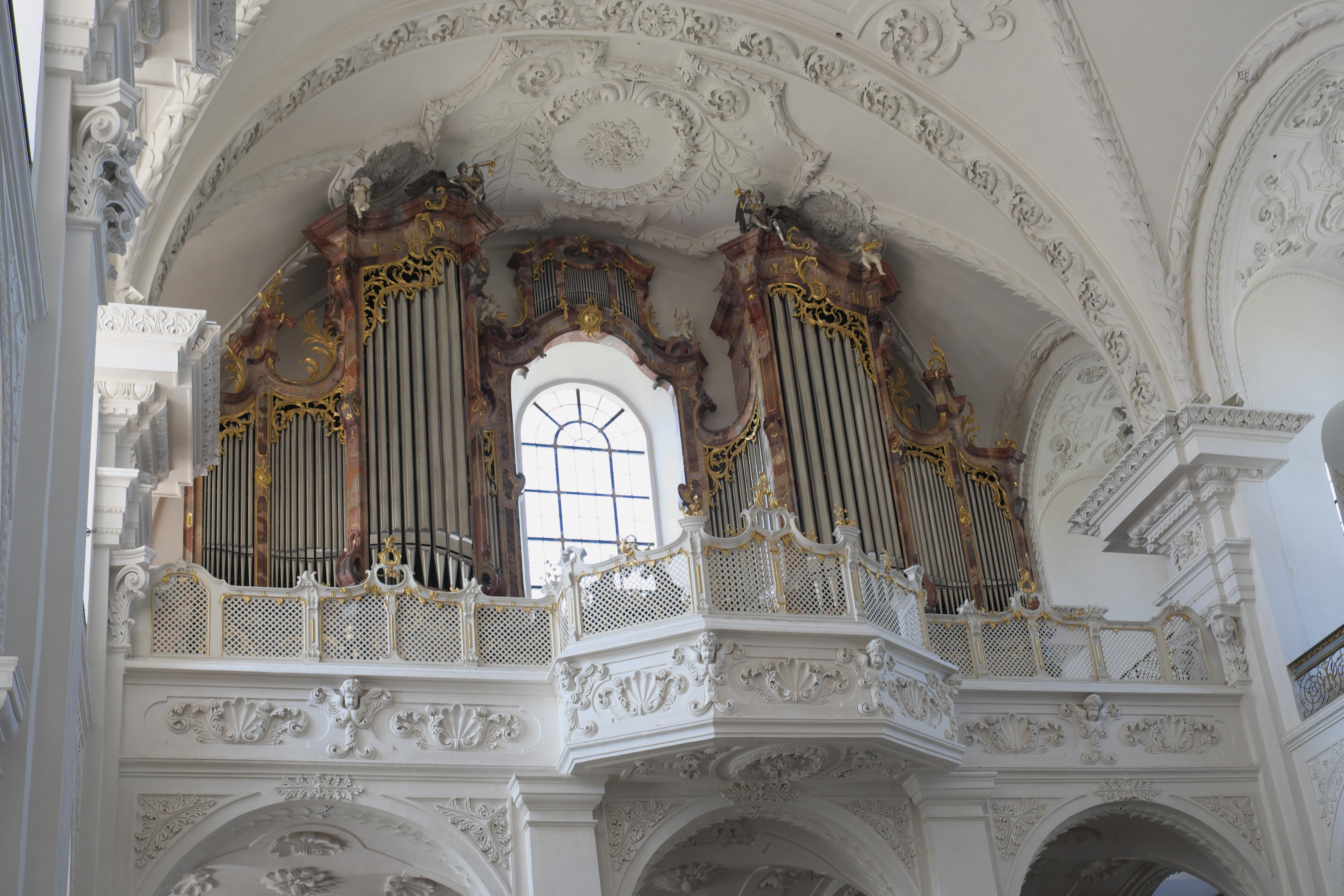 Ehemalige Prämonstratenserstiftskirche, Münster St. Peter und Paul, in Obermarchtal im Alb-Donau-Kreis (Baden-Württemberg/Deutschland), Orgel